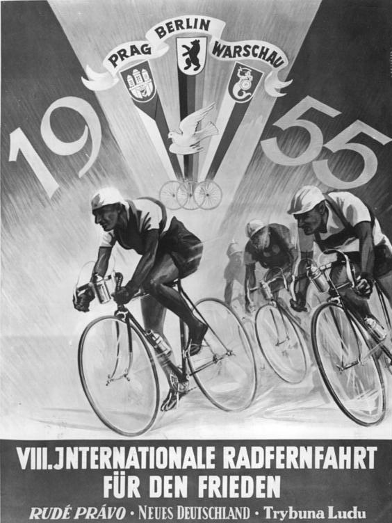 Plakat, VIII. Internationalen Radfernfahrt für den Frieden 1955 Zentralbild 13.4.1955 Plakat (DDR) zur VIII. Internationalen Radfernfahrt für den Frieden 1955 Prag-Berlin-Warschau.